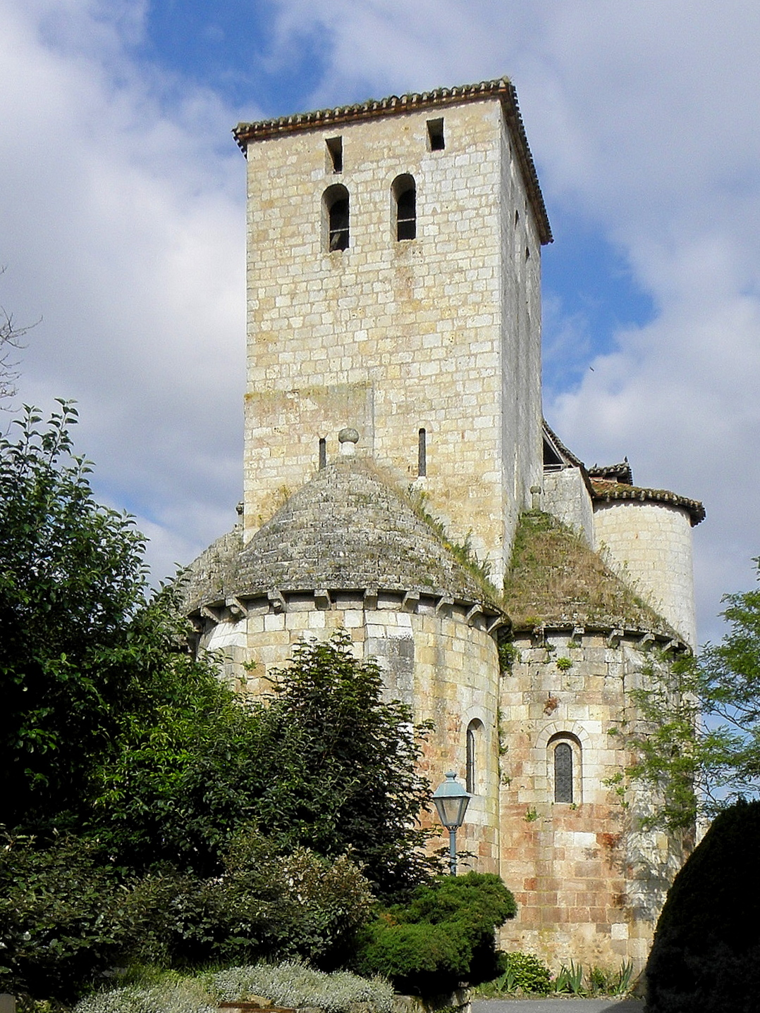 Église Sainte-Marie d'Aubiac (47). Chevet.